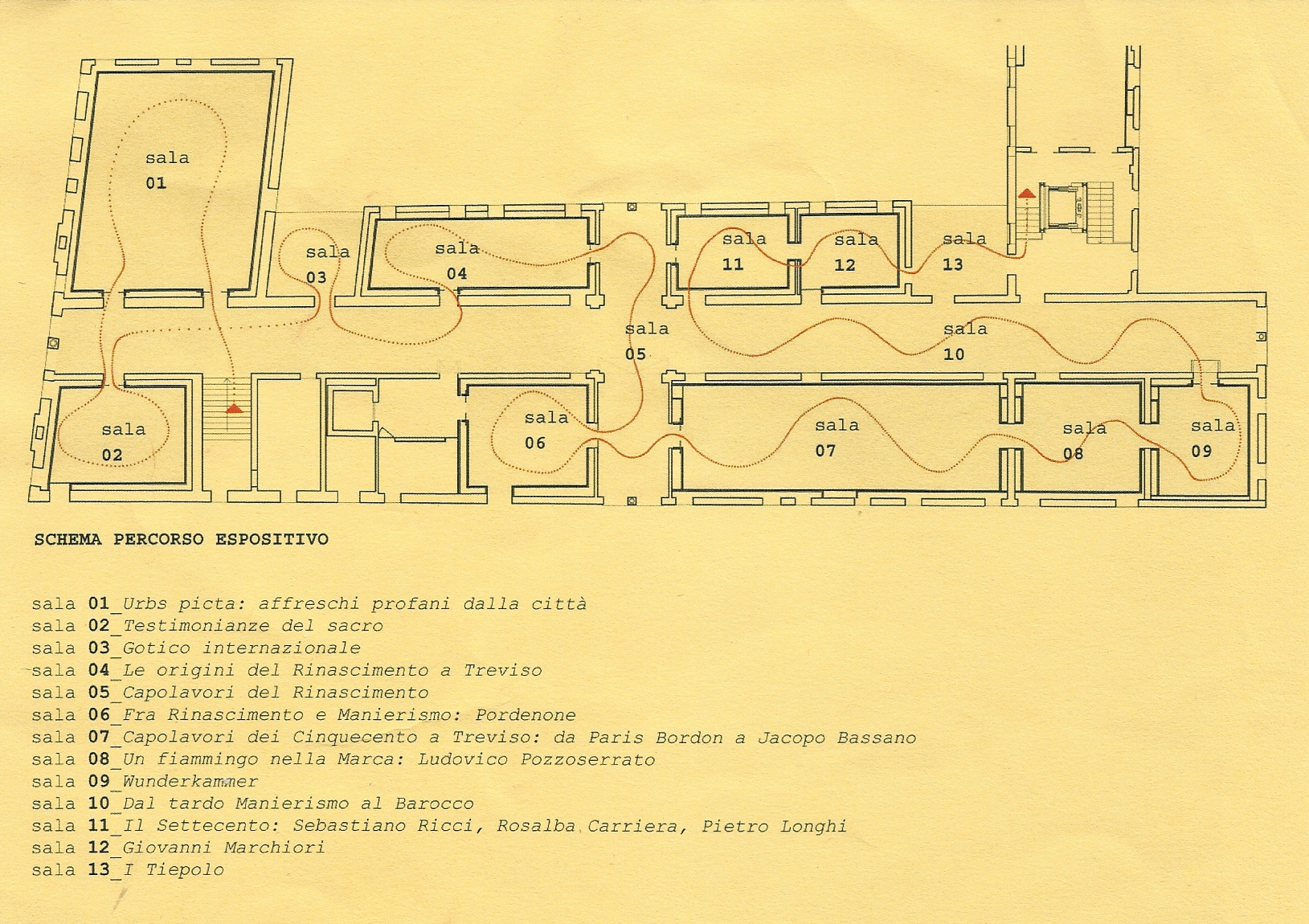 Mappa della pinacoteca comunale di Treviso